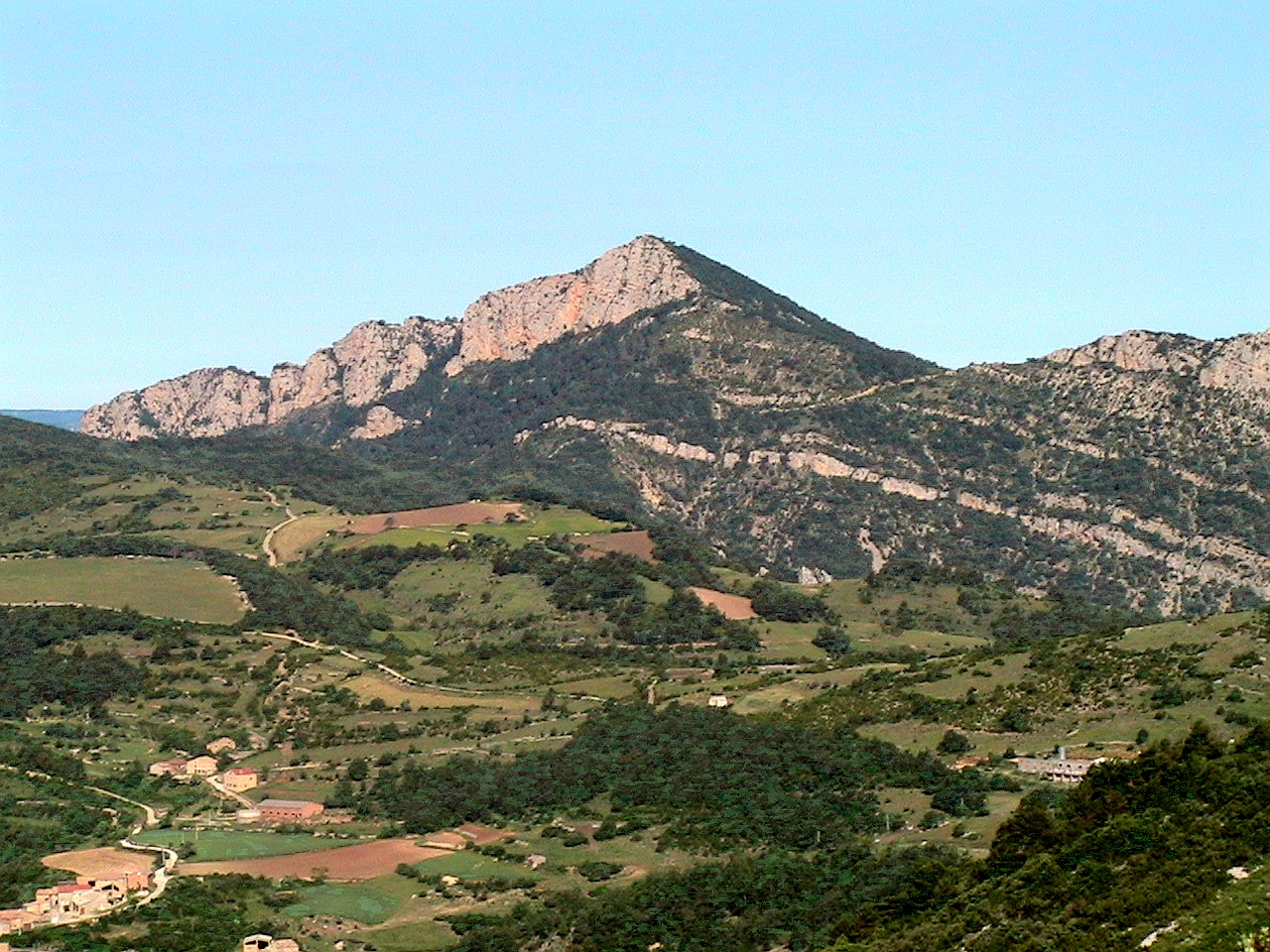 El pic de Turp, cim culminant de la Serra de Turp, per damunt de les cases i camps de Llinars. A Fígols i Alinyà (Alt Urgell - Catalunya)